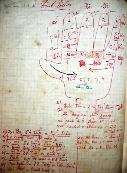 Tuvi1